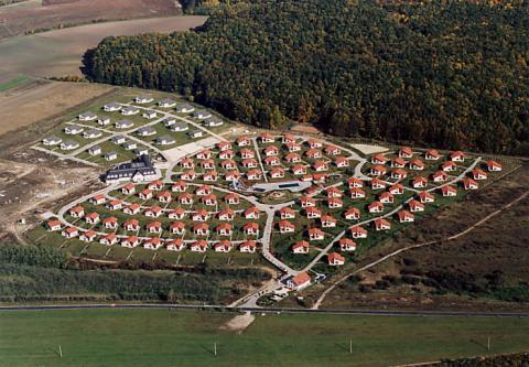 Várgesztes, Hungary, aerialphotgraphy